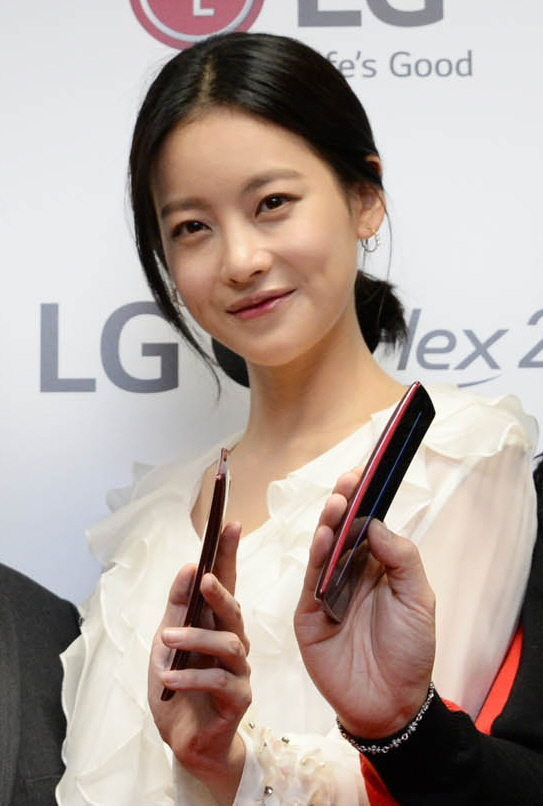 ‘진정한 커브드 스마트폰’ ■ 30일, 국내 이동통신 3사 동시 출시 □ 한국 출시 후 글로벌 시장 공략 □ 국내출시 가격은 80만원 대 후반 □ CES 어워드 휩쓴 혁신성으로 커브드 스마트폰 시장 공략 ■ 예술품으로 거듭난 커브드 디자인 □ 전면, 후면, 측면 등에 각기 다른 4개 곡률을 적용한 입체적 커브드 디자인 □ 패션 디자이너 최범석氏, 마케팅 크리에이티브 디렉터로 참여 ■ 프리미엄 타이틀에 걸맞은 고성능 하드웨어 □ 퀄컴 64비트 옥타코어 칩셋 탑재 □ ‘3밴드 LTE-A’ 지원, 1GB 영화 한편을 27초 만에 다운로드 □ 전작보다 18배 빨라진 셀프 힐링 기능, 10초 만에 스크래치 복원 □ 5.5인치 풀HD 플라스틱 OLED 디스플레이 탑재 ■ 일상의 혁신을 가져올 사용자 경험(UX) □ 꺼진 화면에서 터치만으로 주요정보 확인 가능한 ‘글랜스 뷰’ □ 셀카 찍고 바로 촬영 결과물 확인 가능한 ‘제스처 뷰’